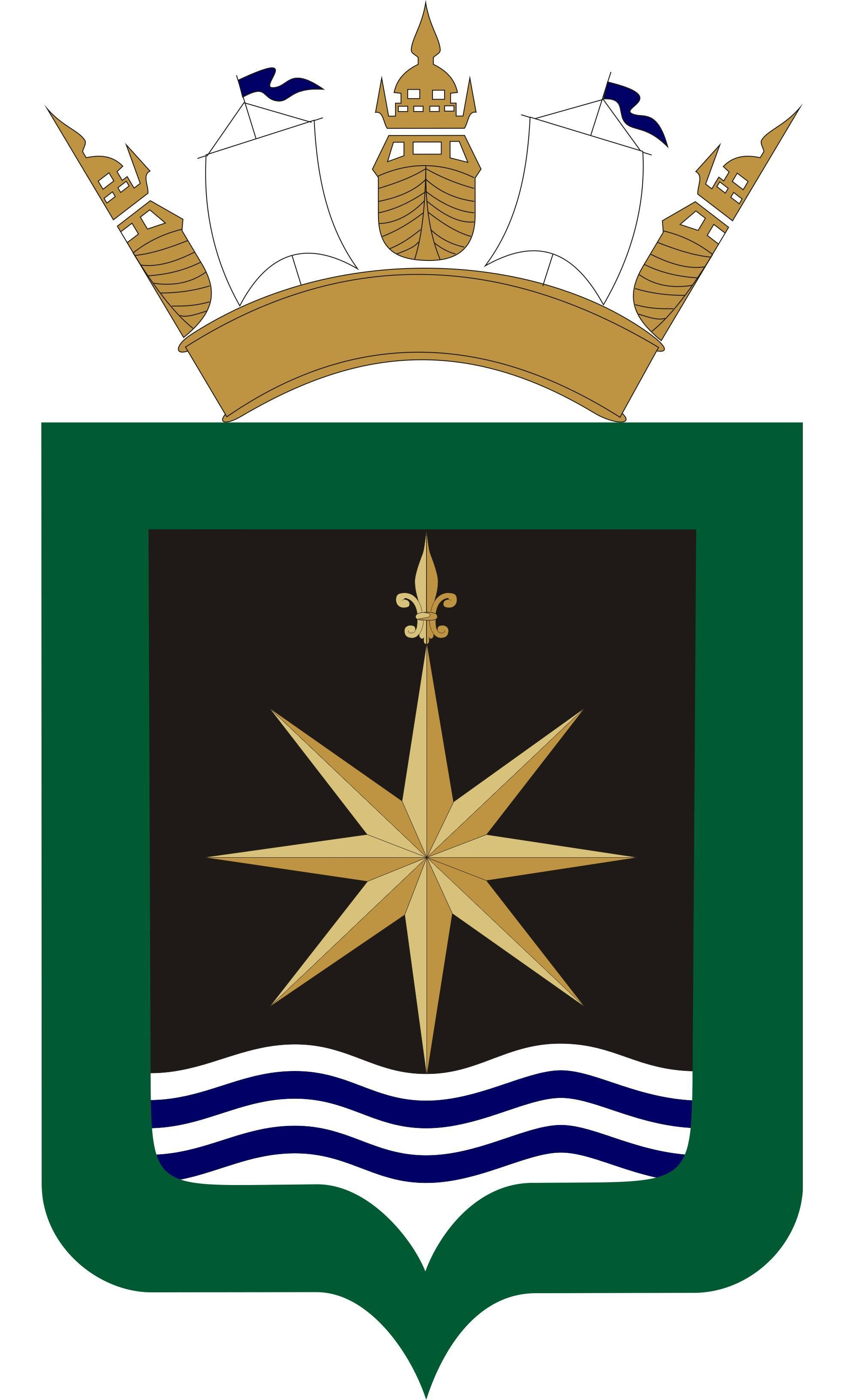 Escudo actual de SOHMA